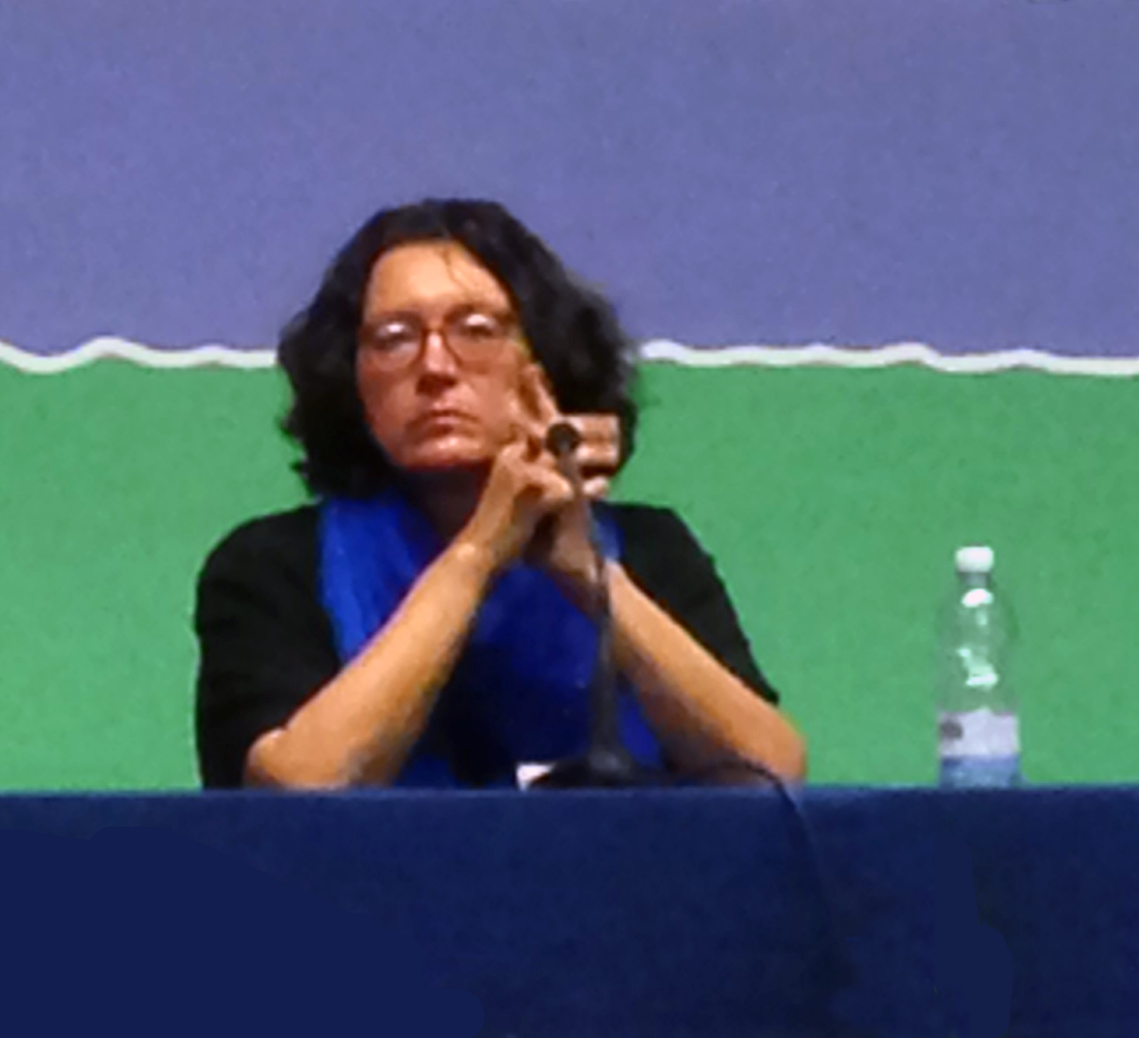 Foto di Amira Hass a Torino.